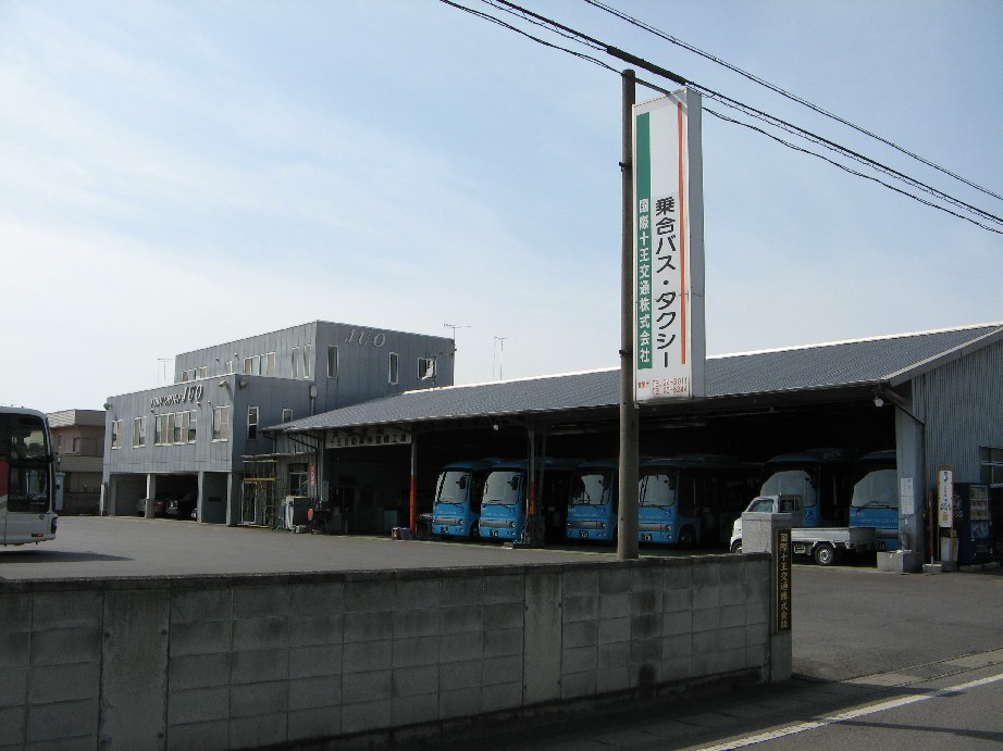 国際十王交通伊勢崎営業所